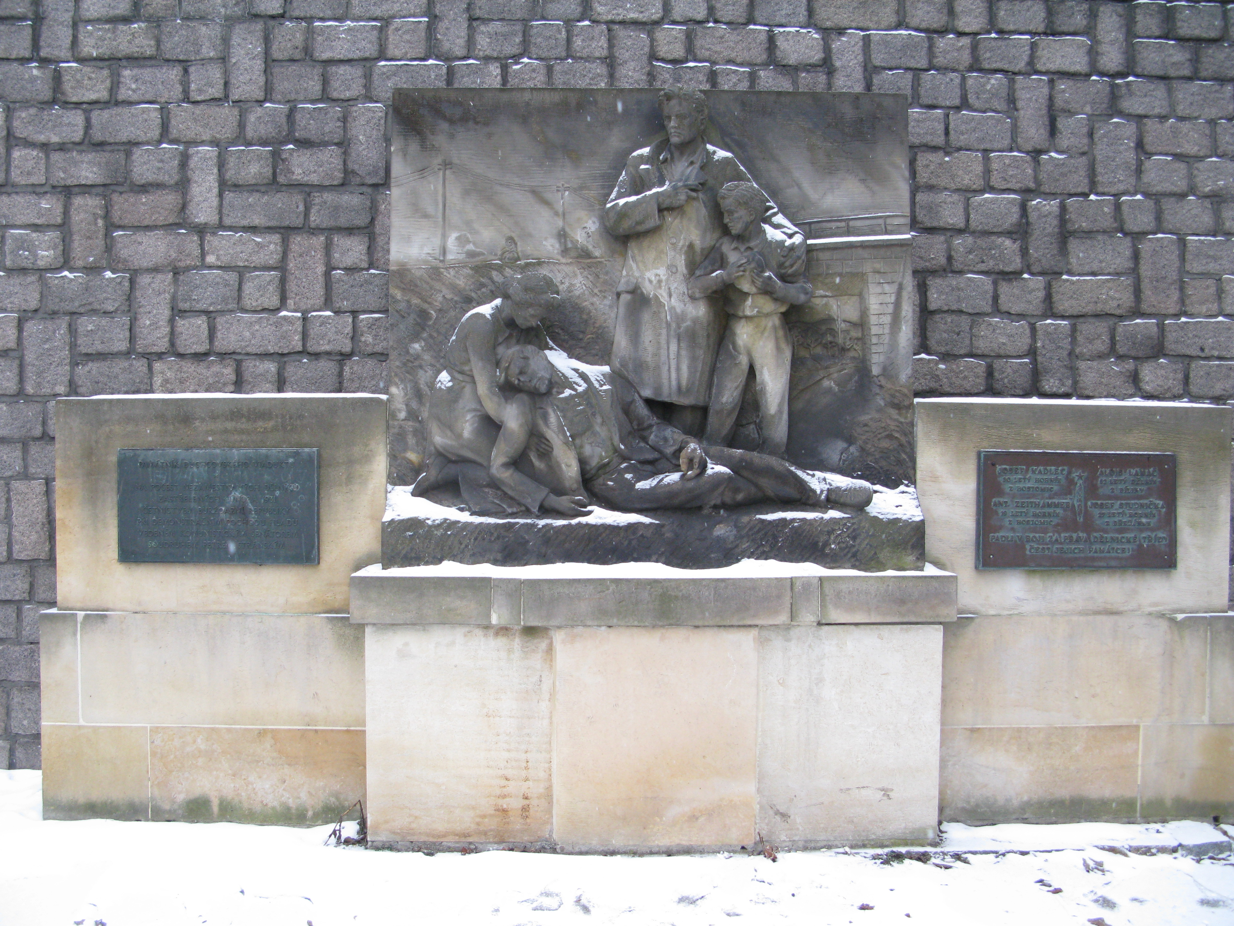 Pomník padlým dělníkům u duchcovského viaduktu